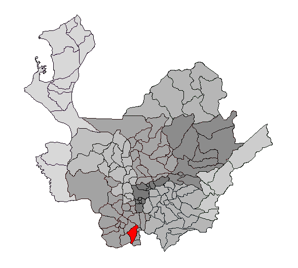 Ubicación del municipio de Támesis en el departamento de Antioquia